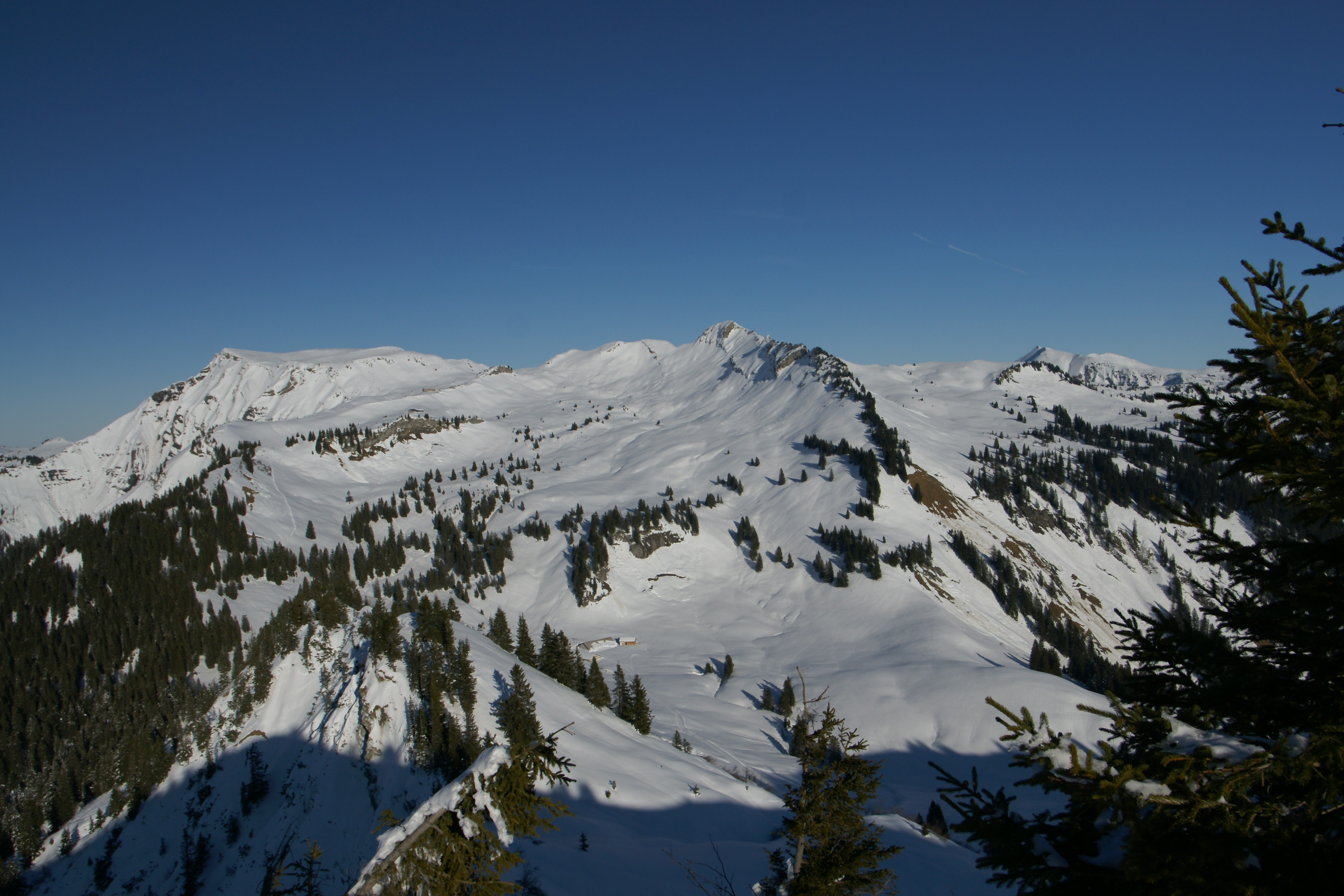 der Hohe Freschen im Bregenzerwaldgebirge gesehen vom Nob in Laterns-Gapfohl in Vorarlberg; Unten im Bild die Untere Saluveralpe, darüber die Obere Saluveralpe und ganz oben das Freschenhaus. Auf dem rechten Kamm das Matonajöchle und der Schusterstuhl. Der Zustieg zum Binnelgrat (links im Bild) erfolgt von der Unterfluhalpe (Dornbirn) und ist nur für Geübte. Schwindelfreiheit und Trittsicherheit ist erforderlich.